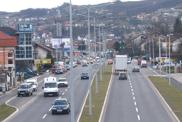 West transit road, Banja Luka